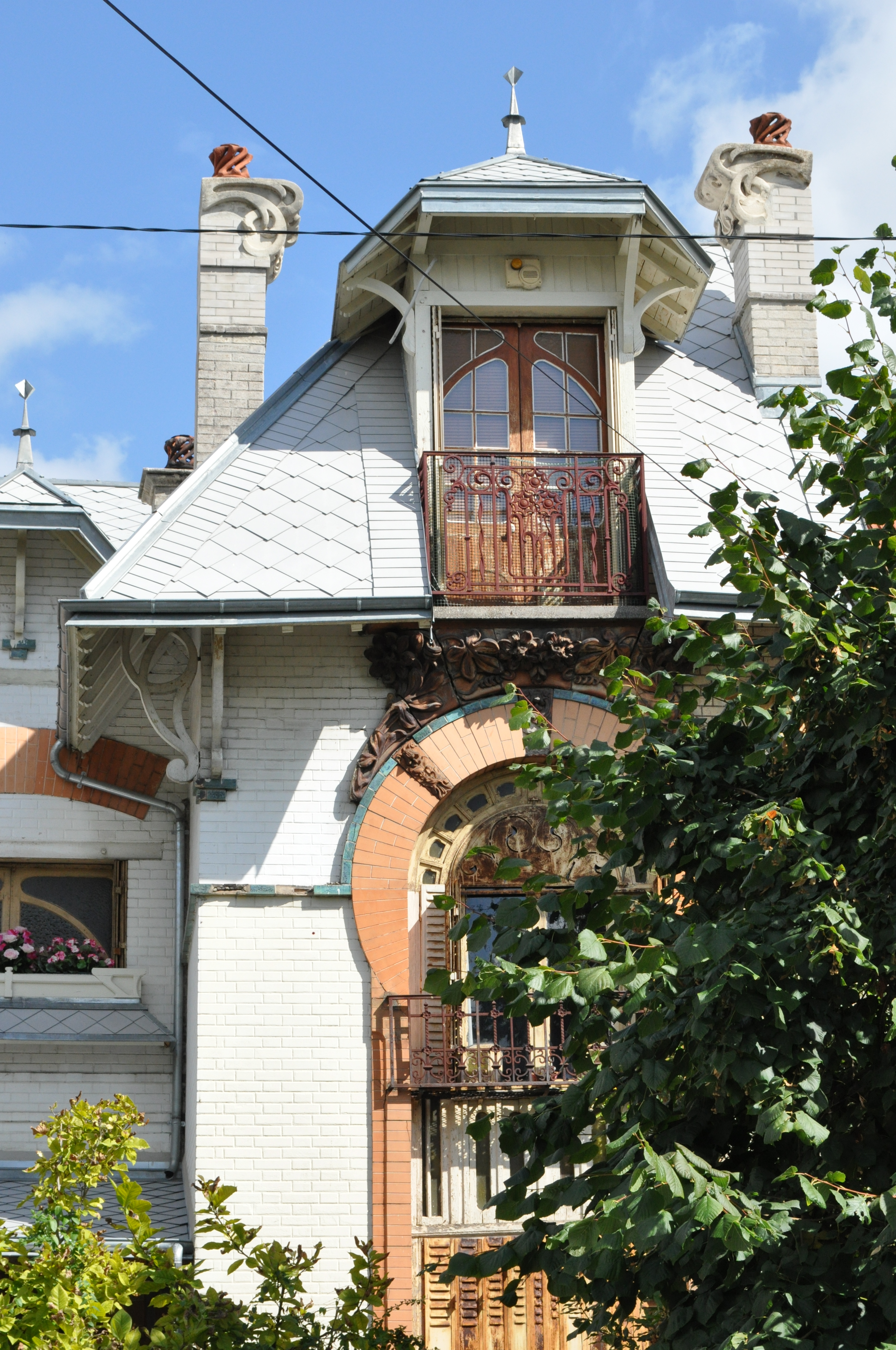 Partie supérieure de la façade de la villa de l'architecte Nachbaur à Nogent-sur-Marne .